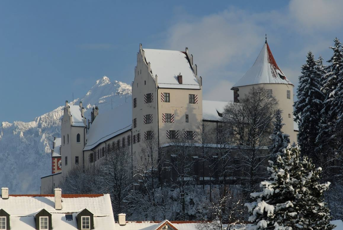 Hohes Schloss Füssen